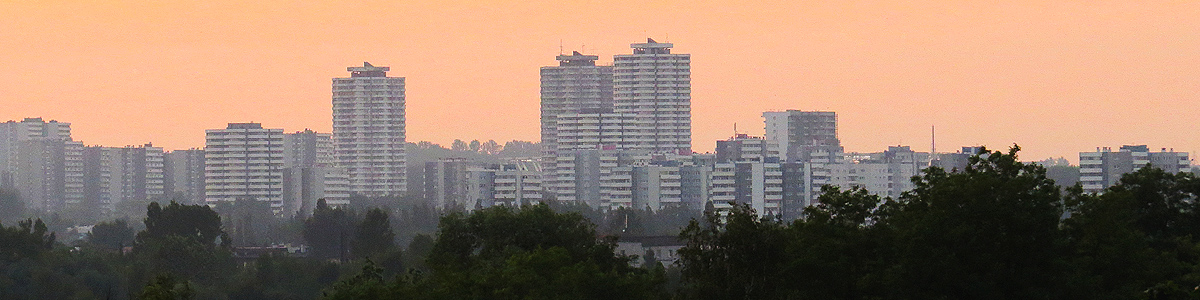 Panorama - widok na część "Dolną" Osiedle Tysiąclecia w Katowicach. Widok od strony południowej.